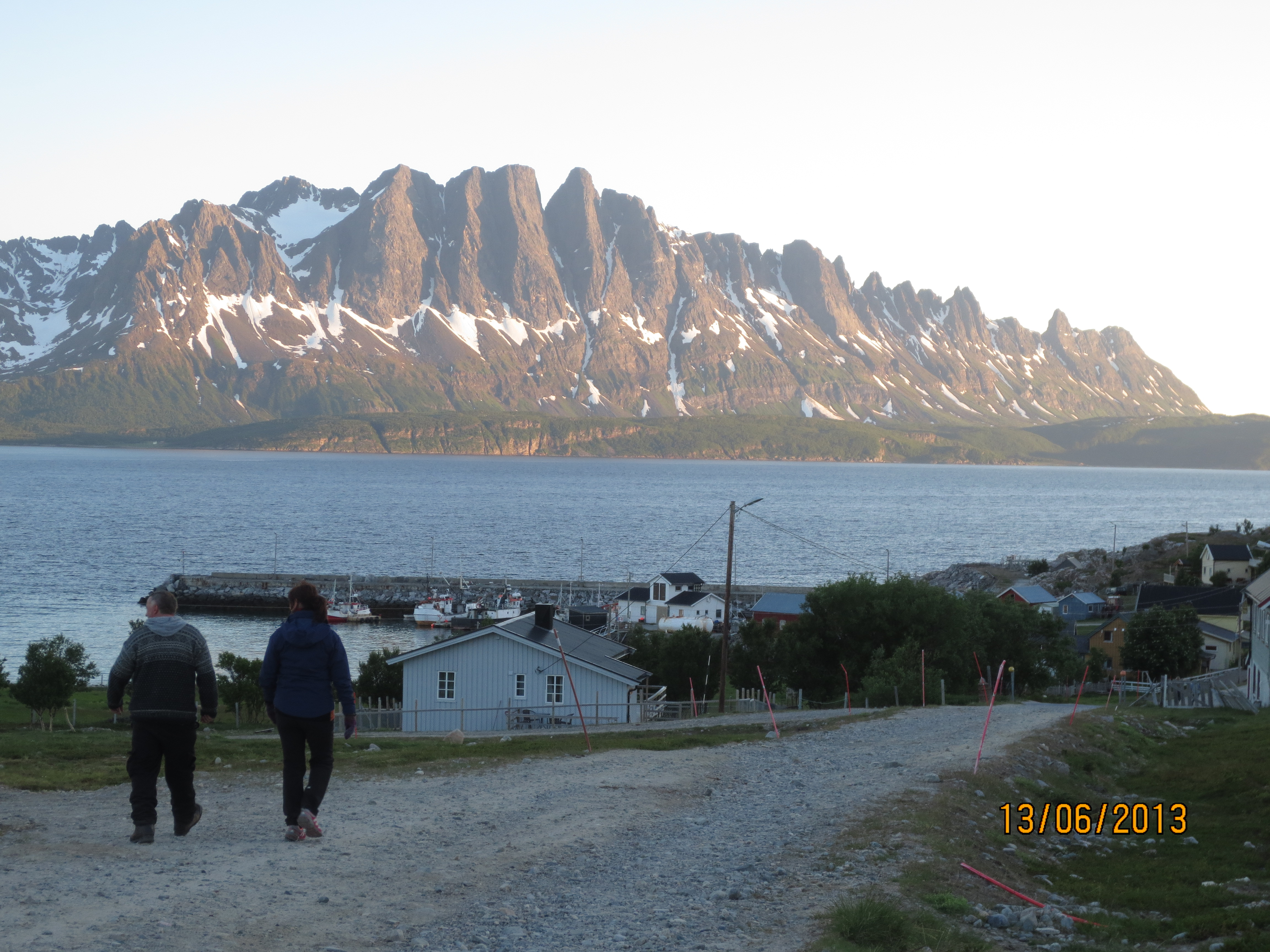 Dunvika, Spildra, Kvænangen kommune